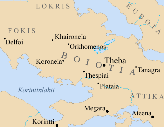 Antiikin Boiotian kartta.